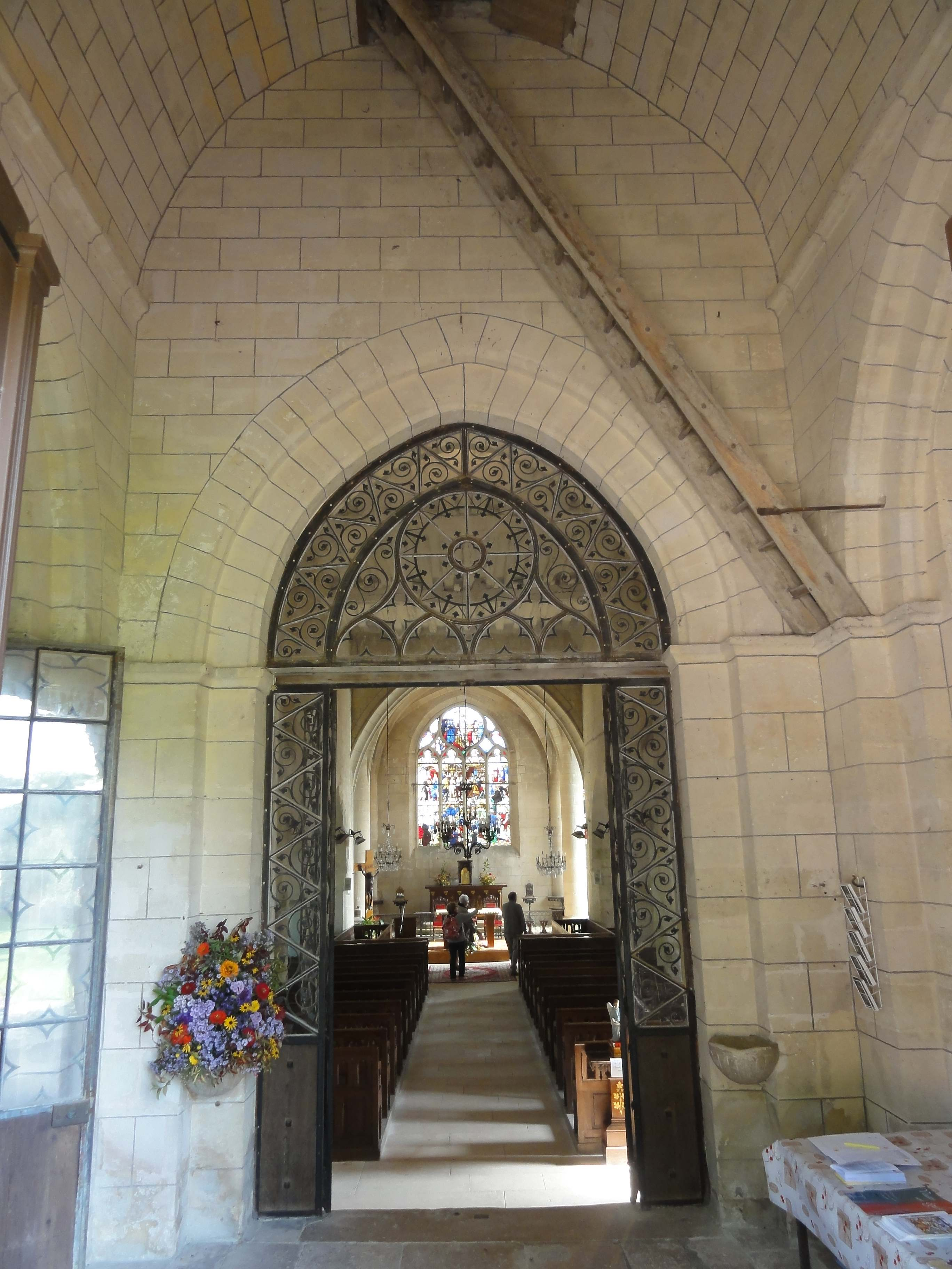 Intérieur de l'église - voir titre.